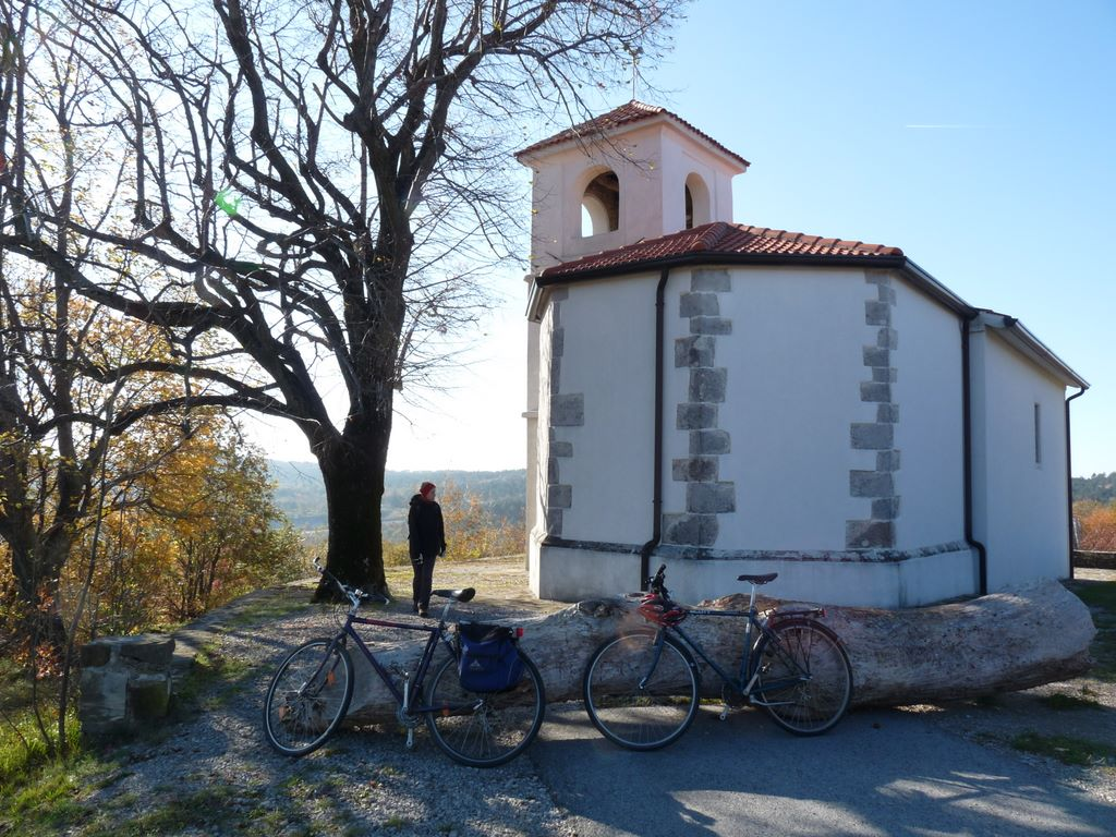 Cerkev sv. Marije Magdalene v Ocizli